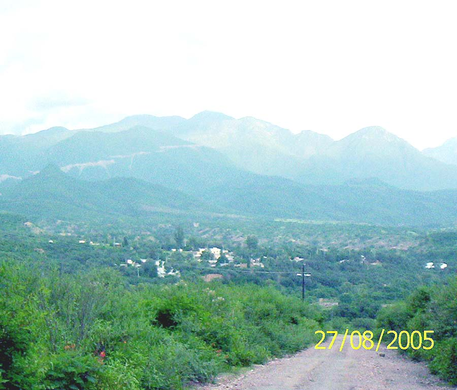 Vistapanoramica de el poblado de Guisamopa